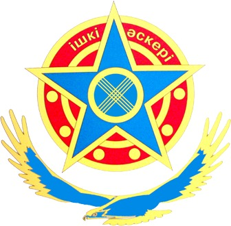 Символ внутренних войск Министерства внутренних дел Республики Казахстан